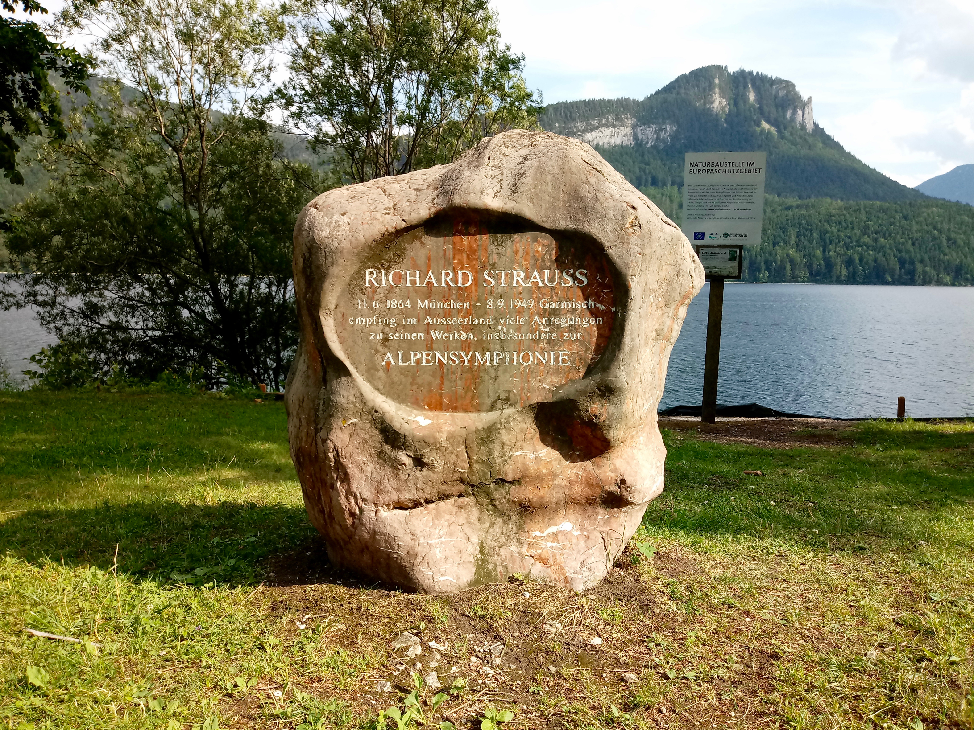 Richard-Strauss-Gedenkstein am Altausseer See.